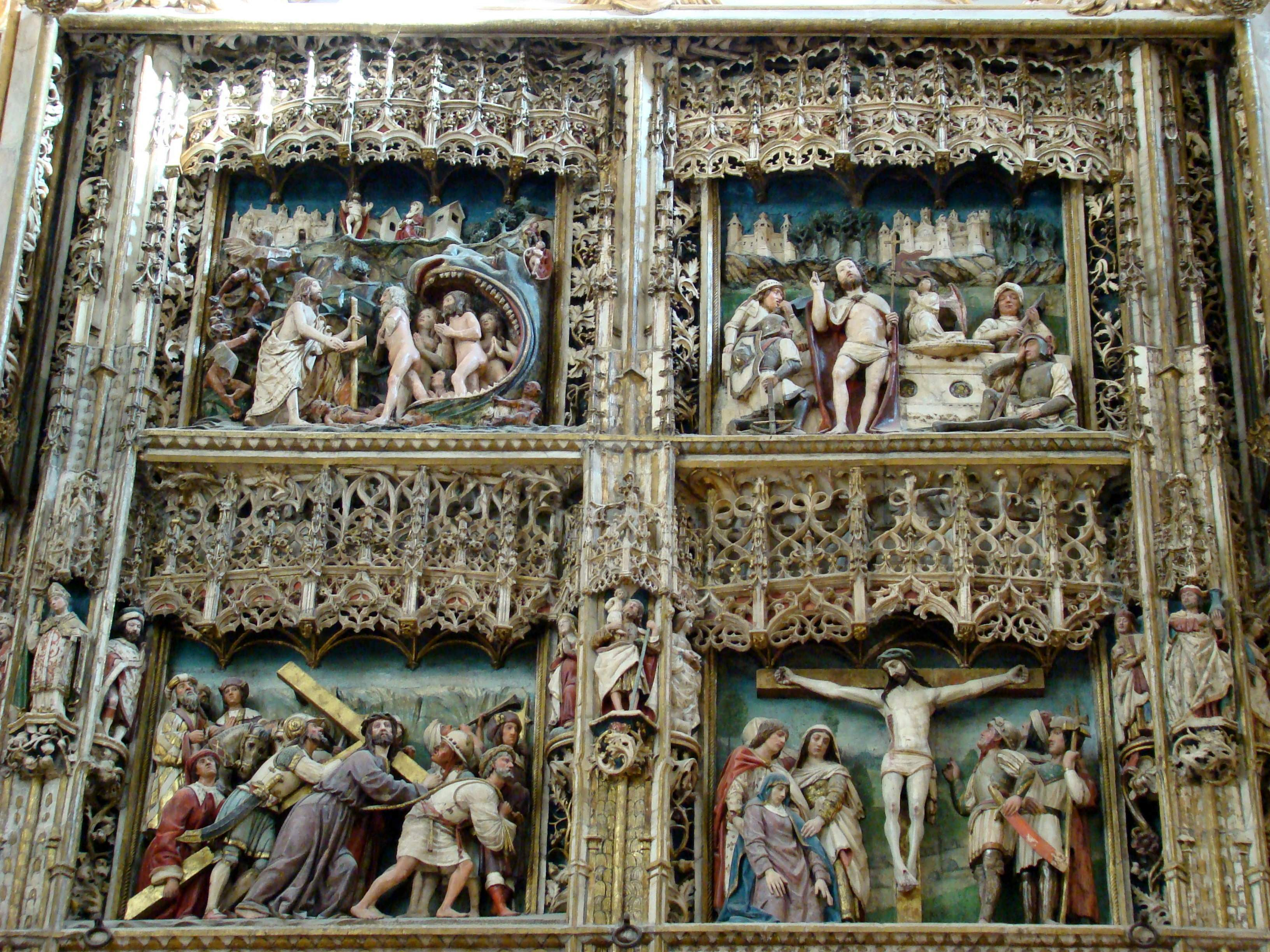 Son El Camino al Calvario y el Calvario (abajo) y La Bajada de Jesús al Limbo y La Resurección (arriba)